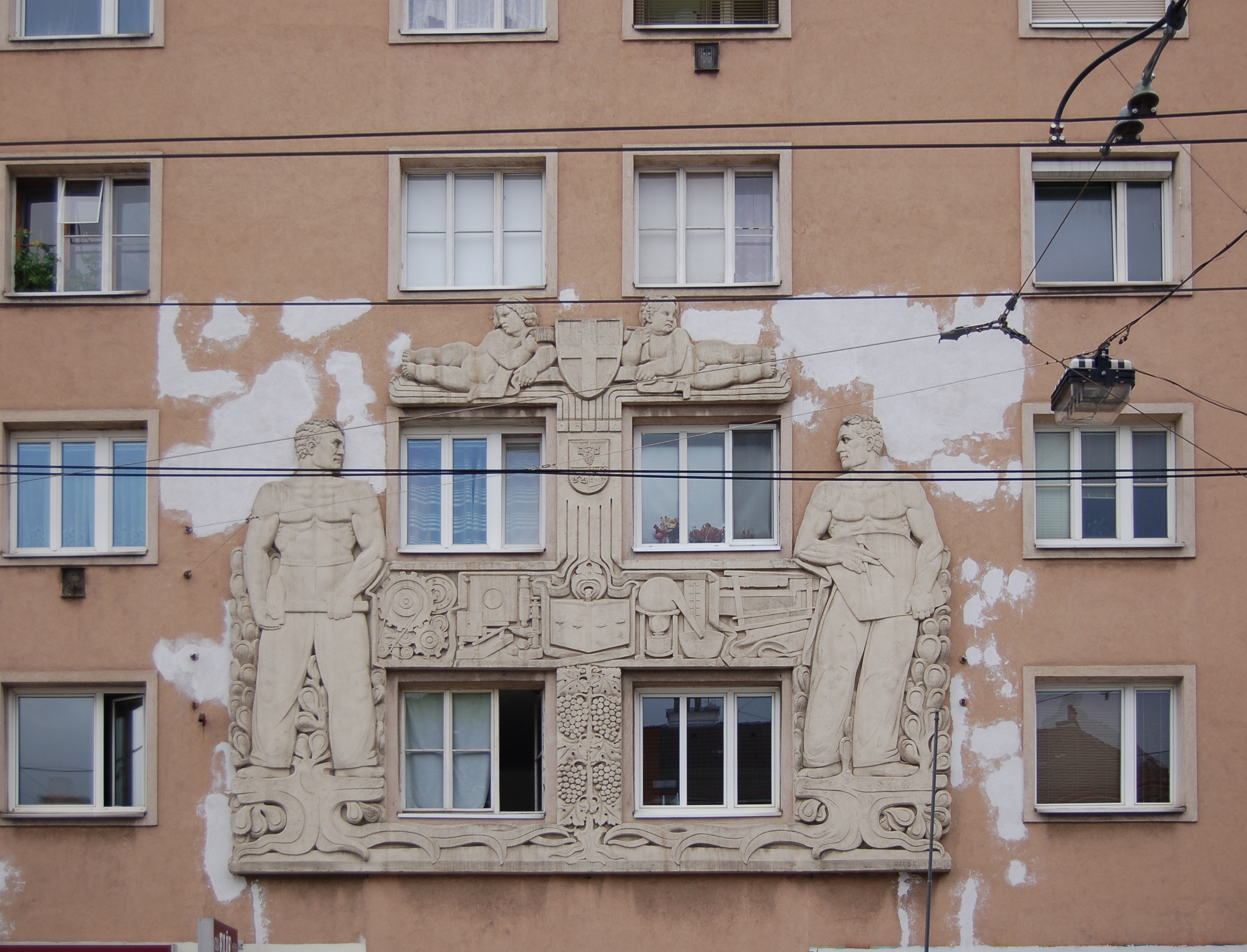 Das denkmalgeschützte Relief "Hernalser Allegorie" der Wohnhausanlage Rosensteingasse 48 in Wien-Hernals befindet sich über dem Haupteingang in der Hernalser Hauptstraße 98. Es wurde 1951 von Alfons Riedel geschaffen zeigt das Wiener und das Hernalser Wappen mit einer Darstellung von Arbeitenden mit Geräten sowie florale Elemente.